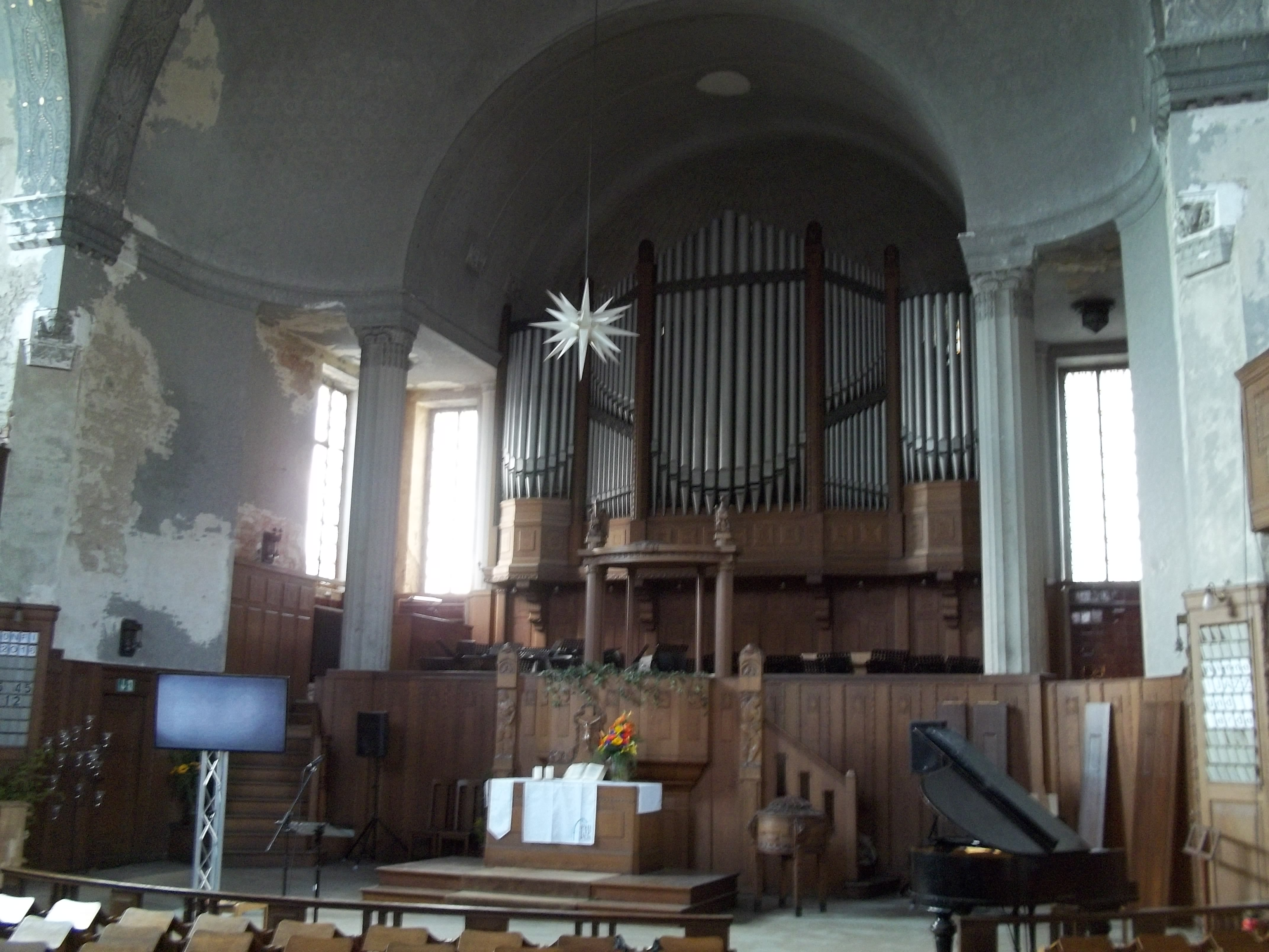 Blick vom Haupteingang in die Philippuskirche